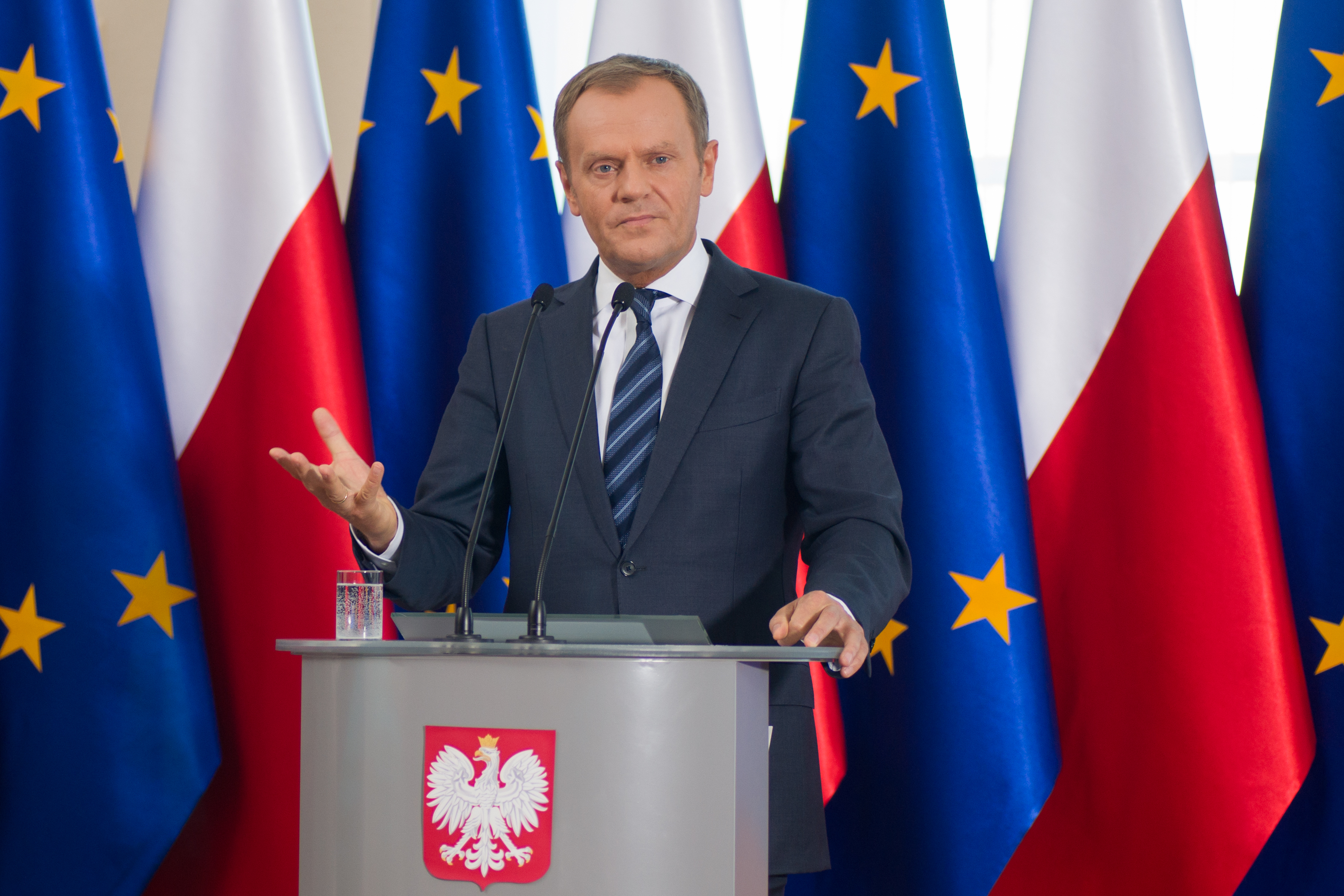 Donald Tusk, 2014, Kancelaria Prezesa Rady Ministrów, Warszawa